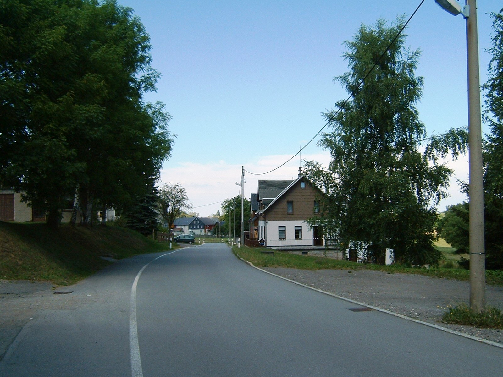 Stützengrün im Erzgebirge, Ortsteil Lichtenau